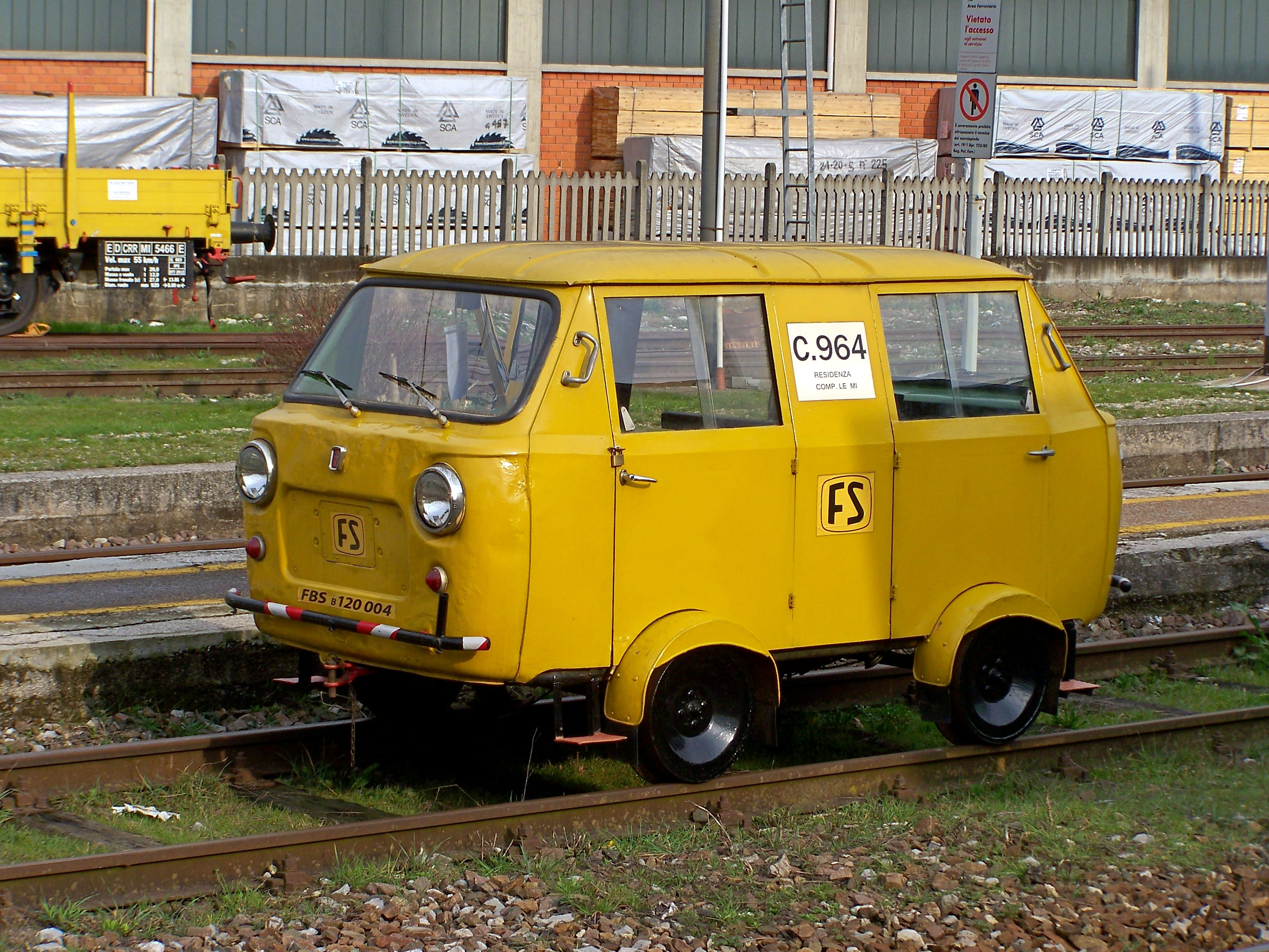 La Draisina FBS B 120.004 in esposizione sul secondo binario di Palazzolo sull'Oglio per la Settima giornata delle Ferrovie dimenticate